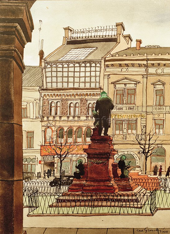 Im Jahr 1936 von dem Maler Carl Grossberg in den Maßen 44 × 31,5 cm geschaffenes Aquarell mit einem Blick von der ehemaligen Auffahrt des hannoverschen Opernhauses auf das Marschnerdenkmal in Hannover und weiter auf die Bebauung an der Georgstraße ...